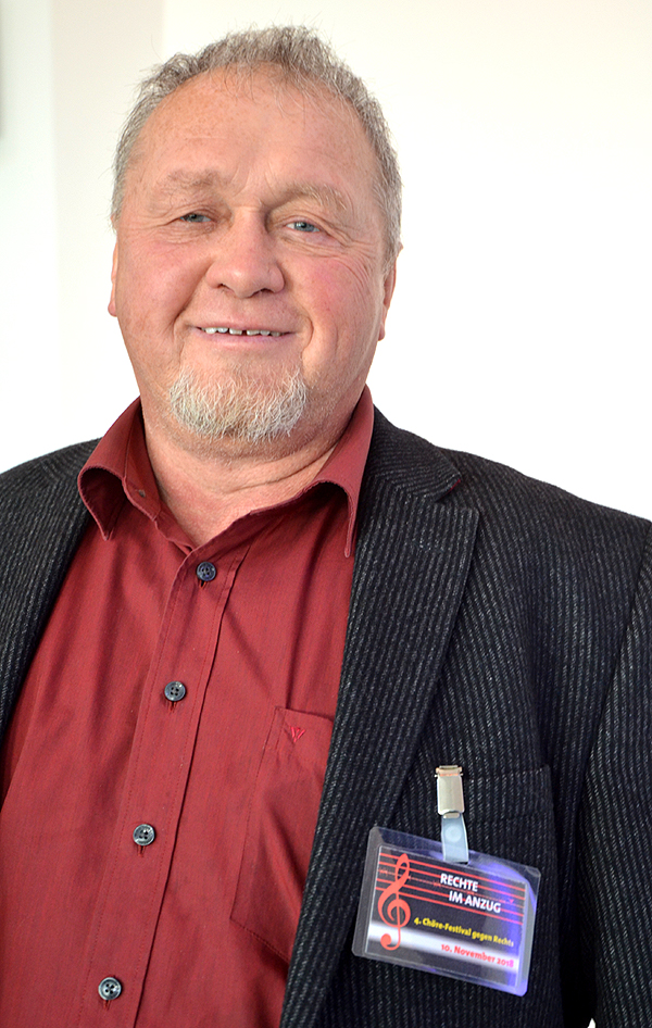 Manfred Wassmann vom DGB-Chor Hannover ist einer der Verantwortlichen des 4. Festivals „Chöre gegen Rechts“ zu dem im Gedenken an den 80. Jahrestag der sogenannten "Reichs-Pogromnacht" rund 25 Chöre aus Nord- und Westdeutschland sowie internationale Chöre wie die Y-Studs A Cappella zu musikalischen Darbietungen am 10. und 11. November 2018 in die Ada-und-Theodor-Lessing-Volkshochschule geladen waren. Darüber hinaus engagiert sich Wassmann unter anderem im Vorstand des Sportvereins SG 74 Hannover im Bereich Medien ...